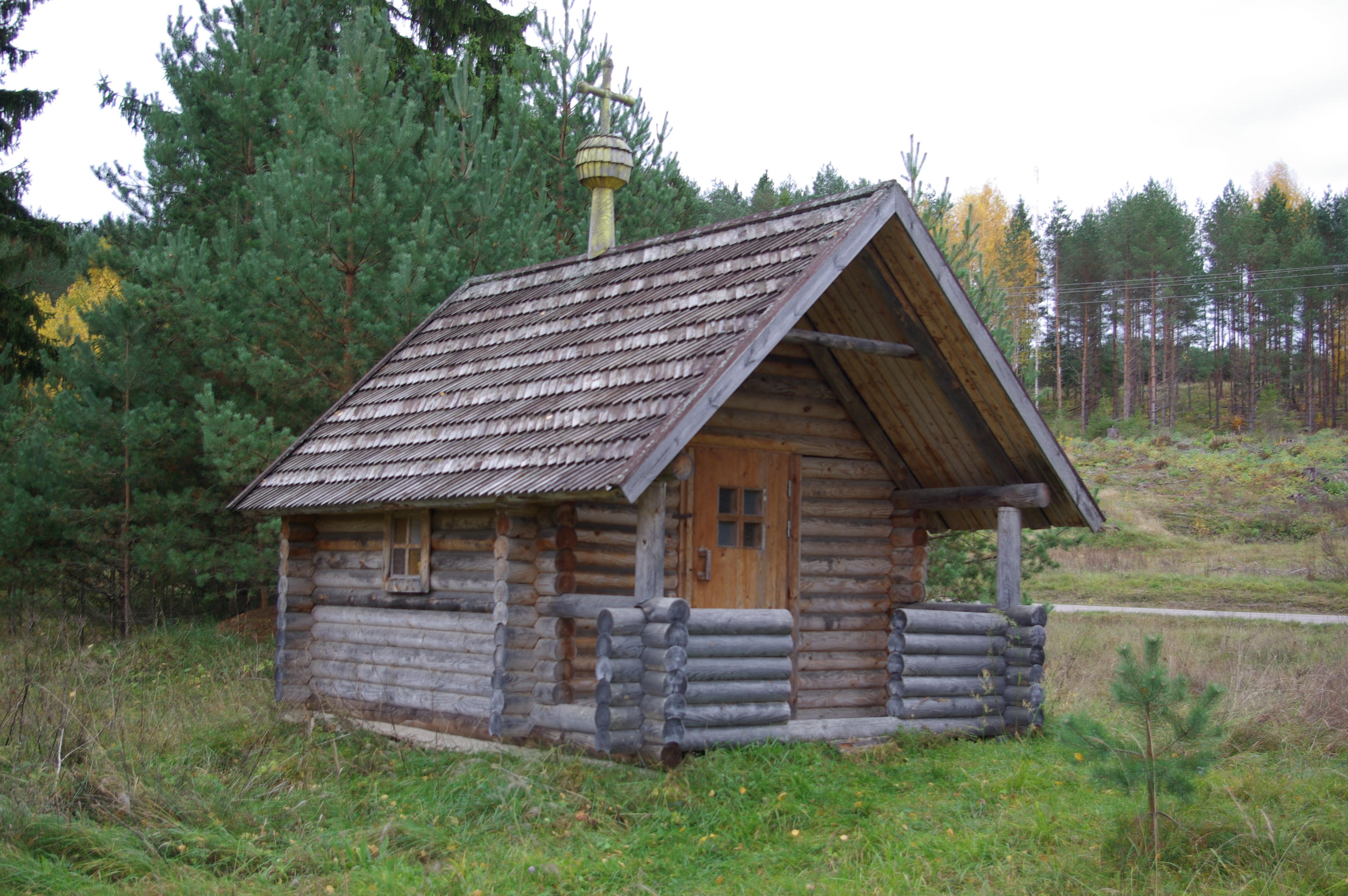 Võmmorski uus tsässon